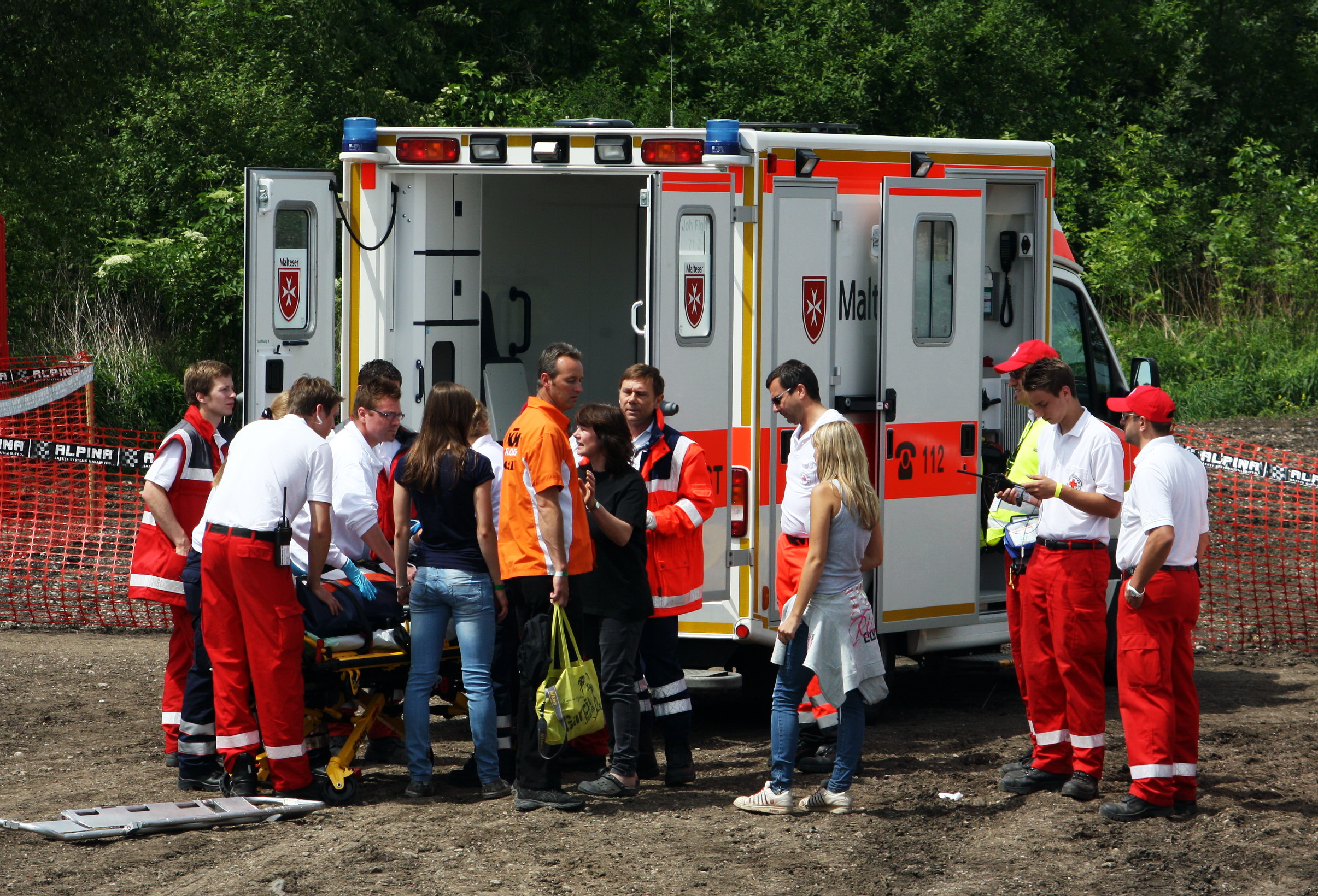 ADAC MX Masters bei Freising in Deutschland. Verletzter wird bei von der Motocorssveranstaltung abtransportiert vom Malteser HIlfsdienst.